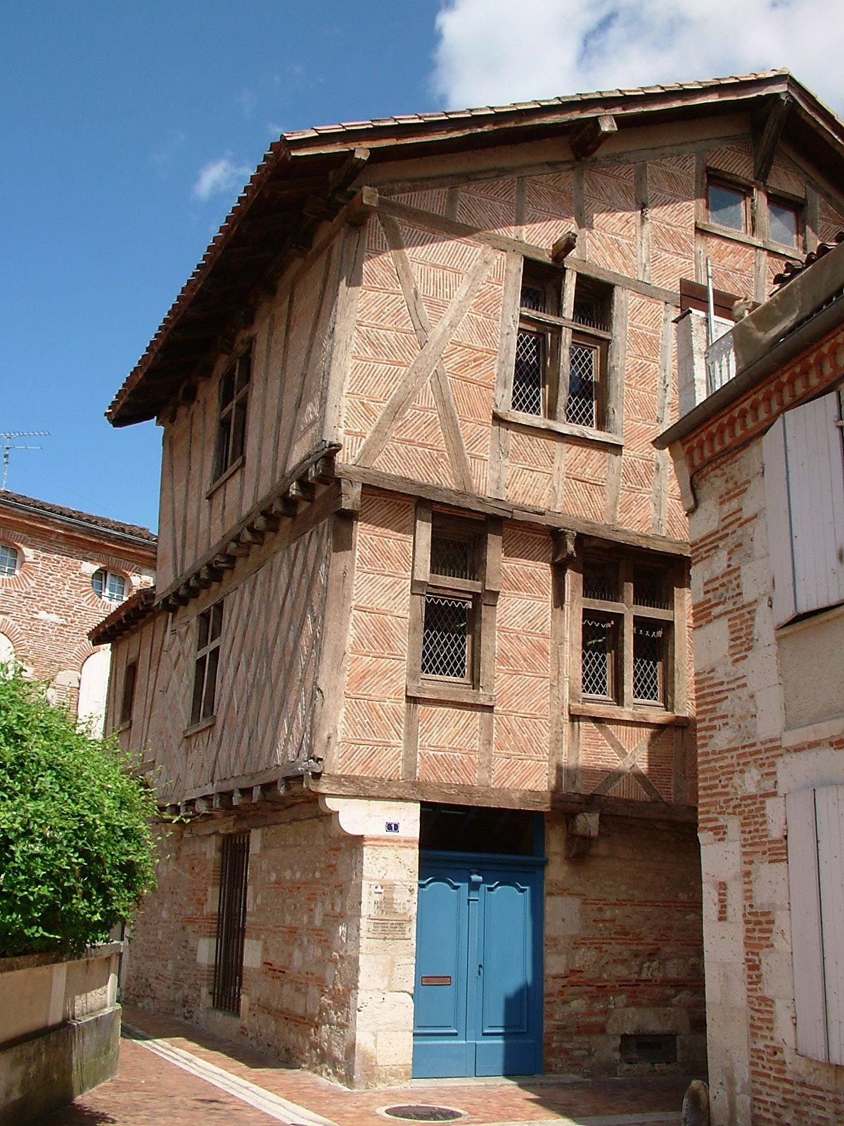 France, Lot-et-Garonne, Agen, maison à colombages, 1 rue Beauville